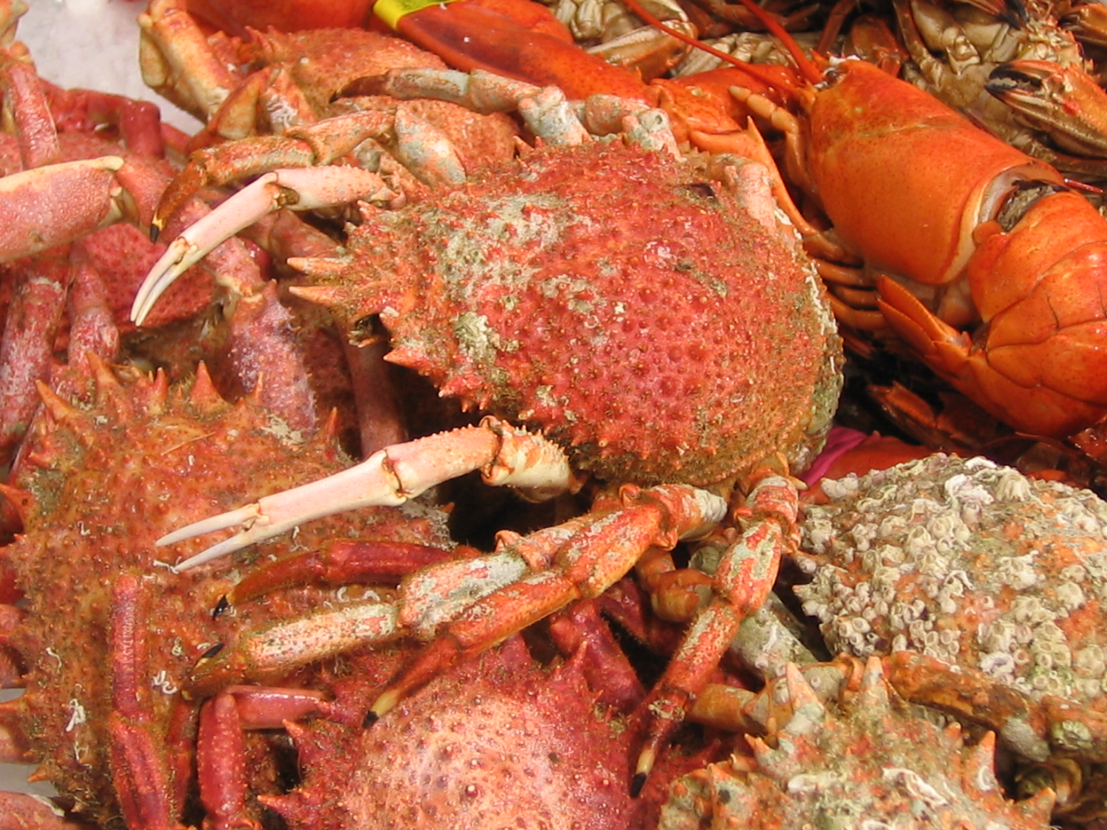 A crab (Maja squinado)